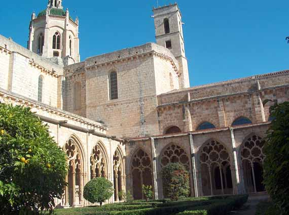 Ángulo noreste del claustro del Monasterio de Santes Creus